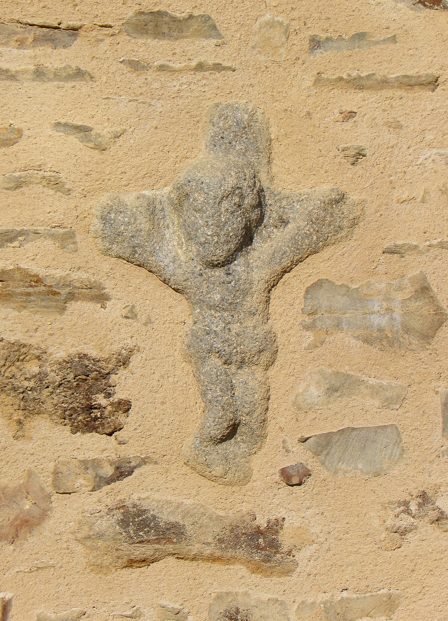 Église de la Présentation de la Vierge d'Aubigné (35). Christ en Croix sculpté, en réemploi dans la costale sud de la nef.